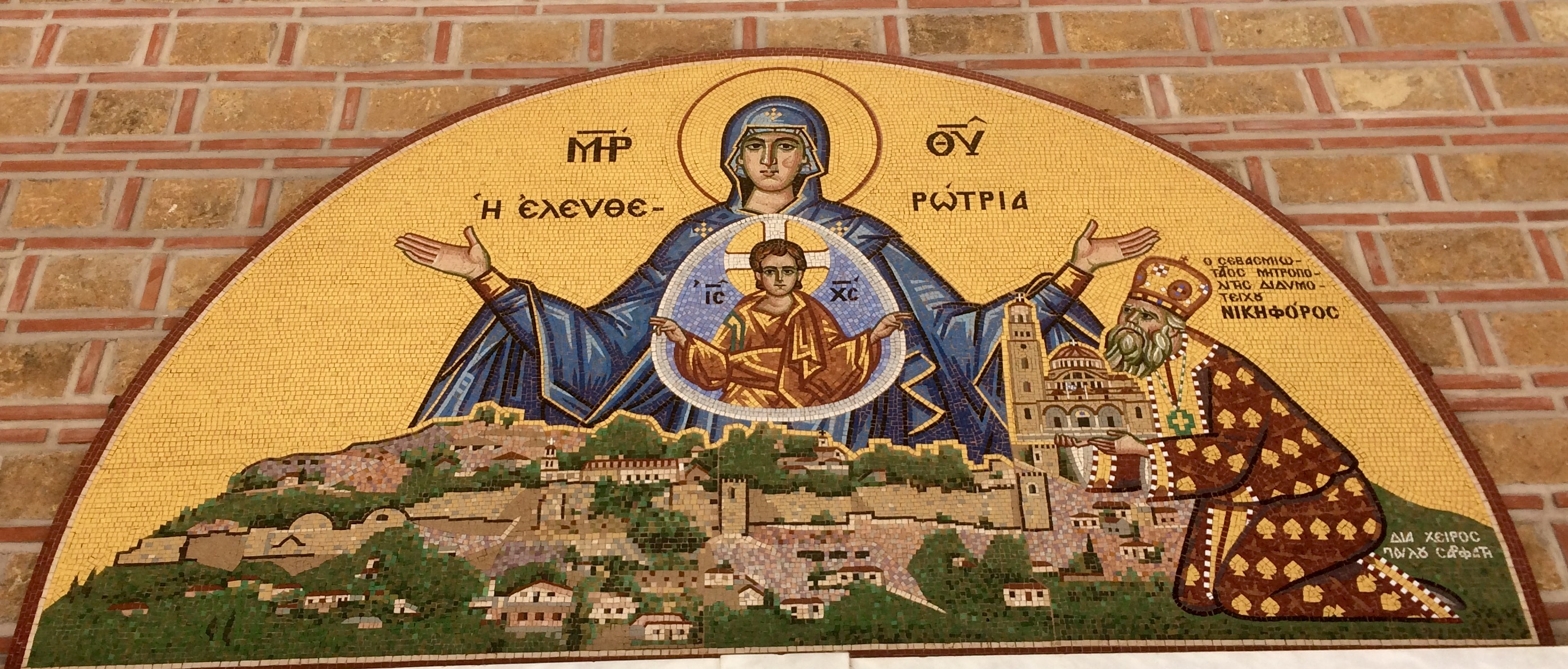 Ikone zeit die Proskynese des Metropoliten Nikiforos vor der Jungfrau Maria